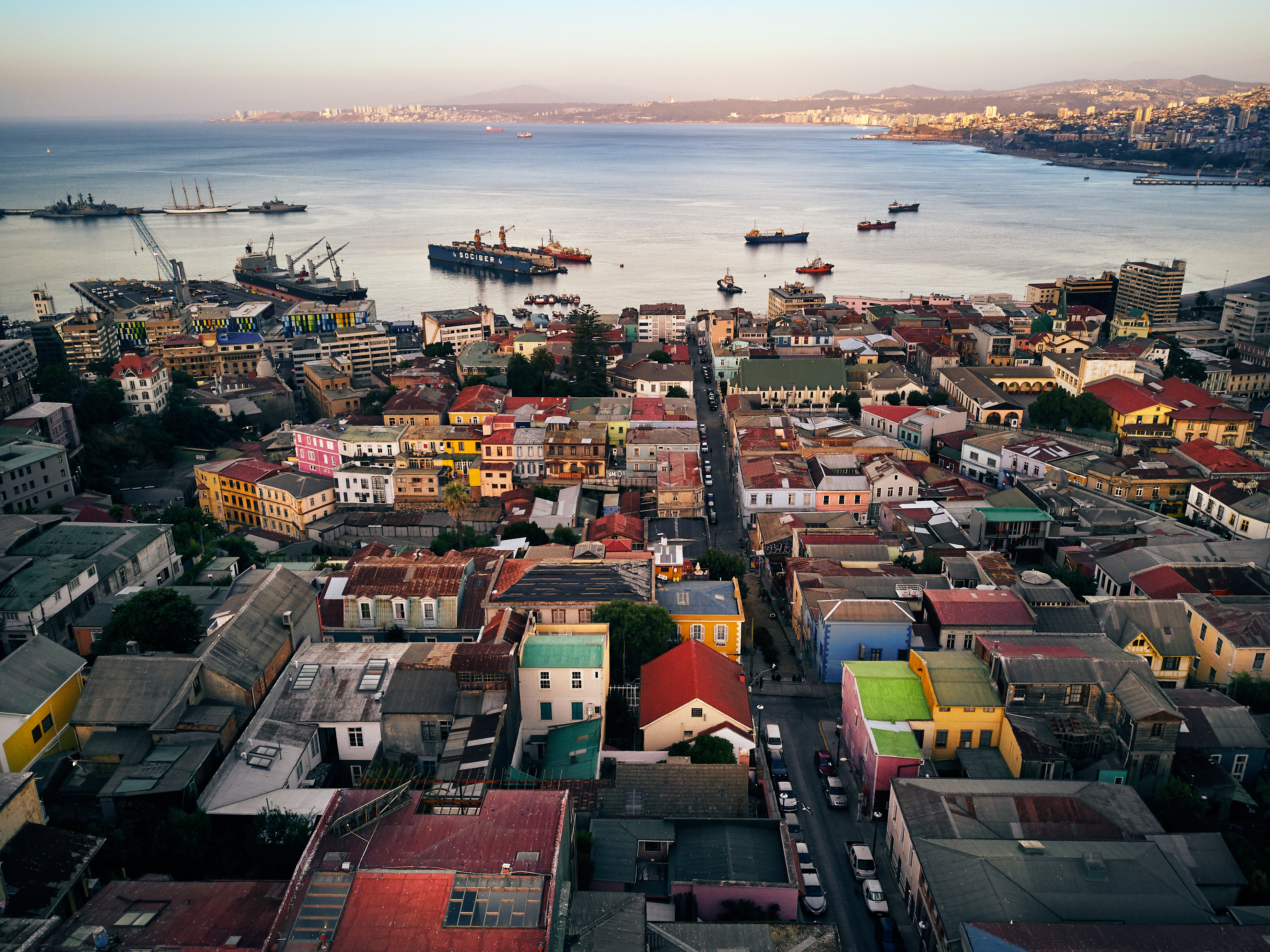 Cerro Concepción, Valparaíso